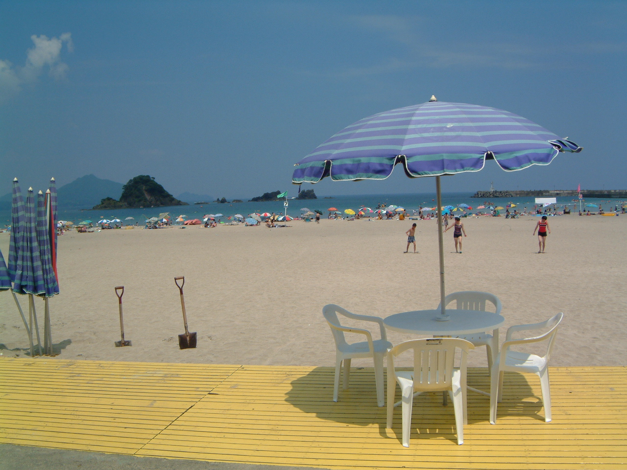 若狭和田海水浴場（福井県大飯郡高浜町）撮影:hide-sp(Gifu, Japan) , 画像投稿者(hide-sp)機材:FinePix6800ZData:2001.07.23